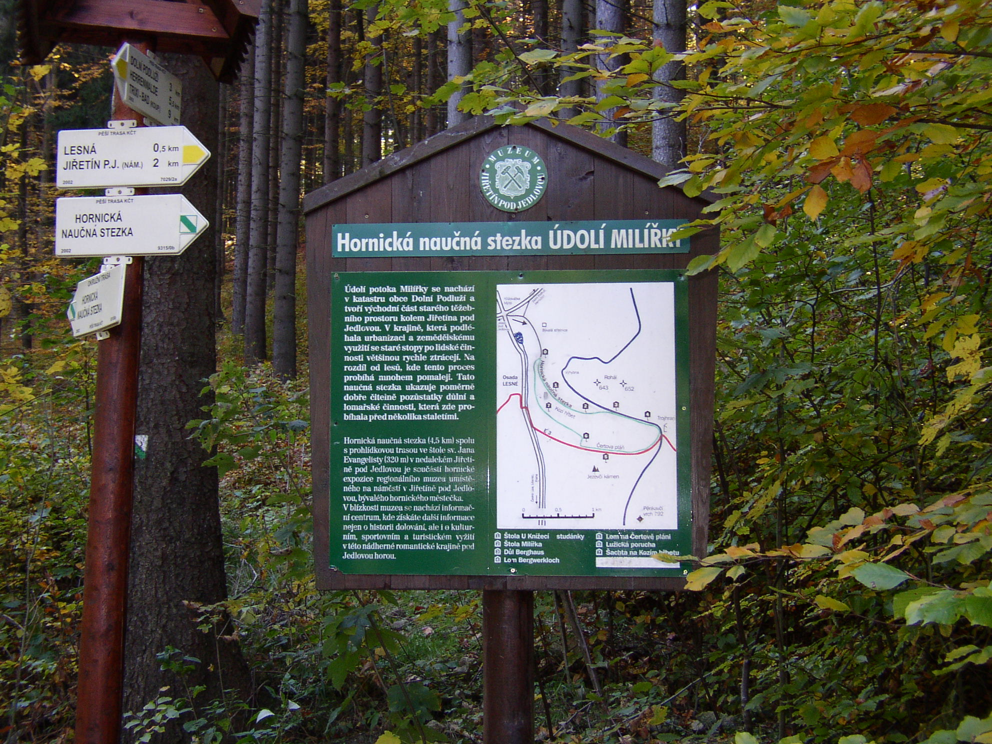 Úvodní informační tabule naučné stezky Údolí Milířka, Dolní Podluží, okres Děčín, Česká republika